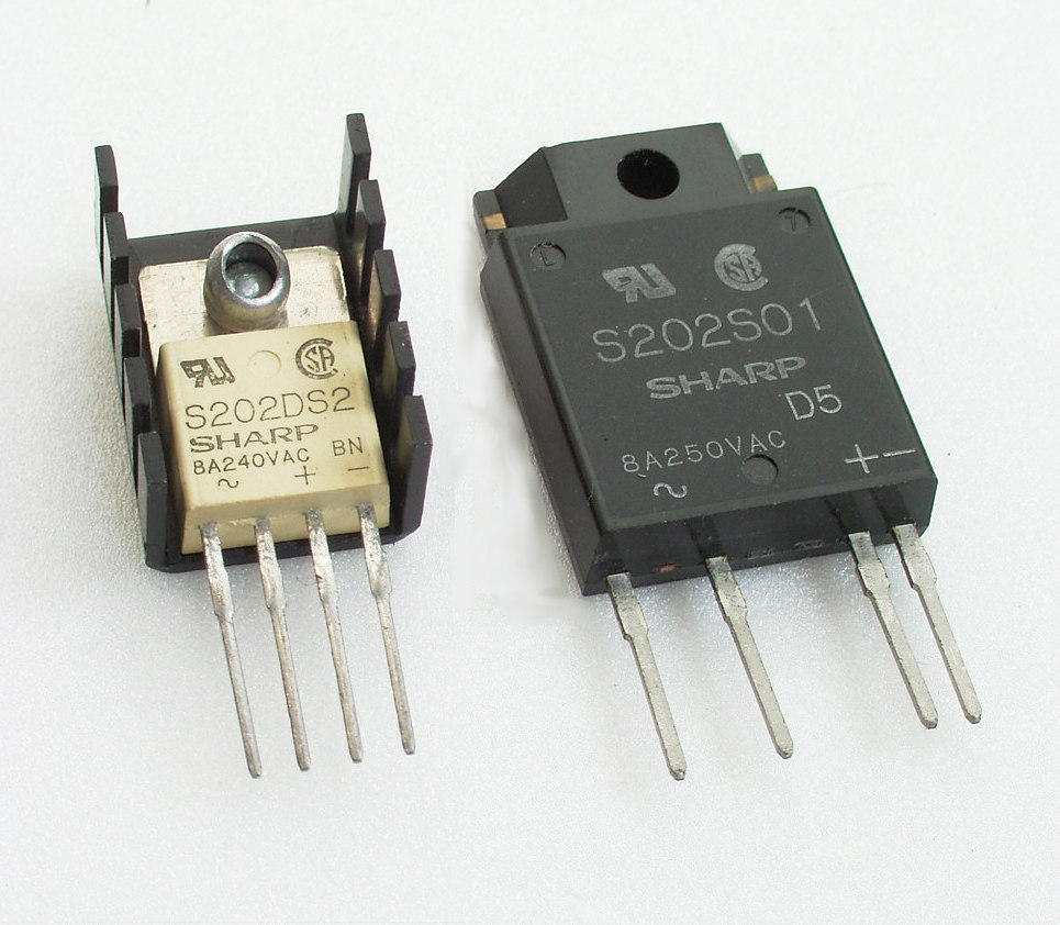 Zwei Halbleiter Relais mit Ansteuerung über integrierten Optokoppler. Links auf kleinem Kühlkörper montiert. Rechts vollisoliertes Gehäuse mit normgerechten Abständen der Pins für ausreichende Kriechstrecken zwischen Steuer- und Lastkreis.